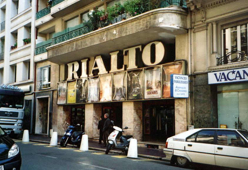 Le cinéma Rialto à Nice (France), rue de Rivoli.